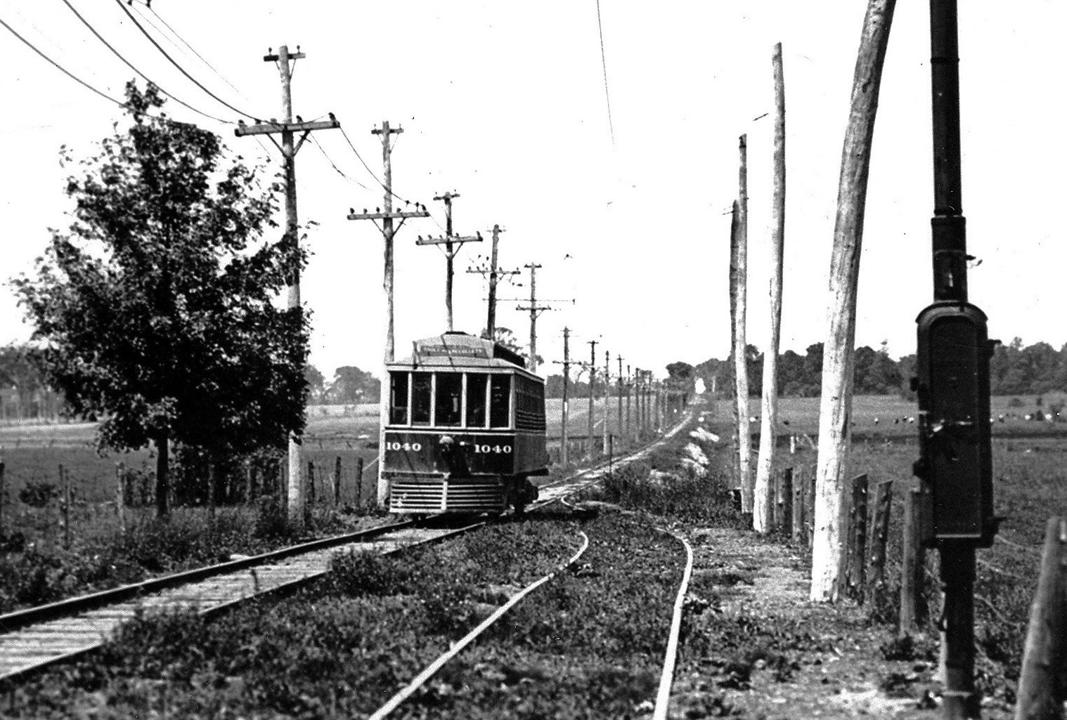 Ligne de tramway «Back island line» qui dessert le Sault-aux-Recollets et Montréal nord à partir des années 1910